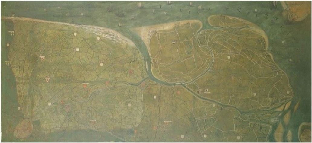 Kaart van het Brugse Vrije (Pieter Pourbus, 1571); collection: Musea Brugge - Groeningemuseum